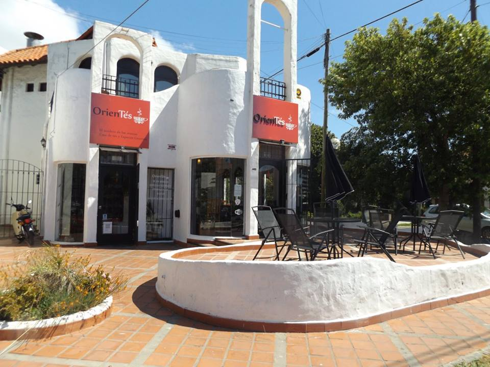 Orientés. Casa de té en hebras y especias gourmet. Patagones 495, Mar del Plata.